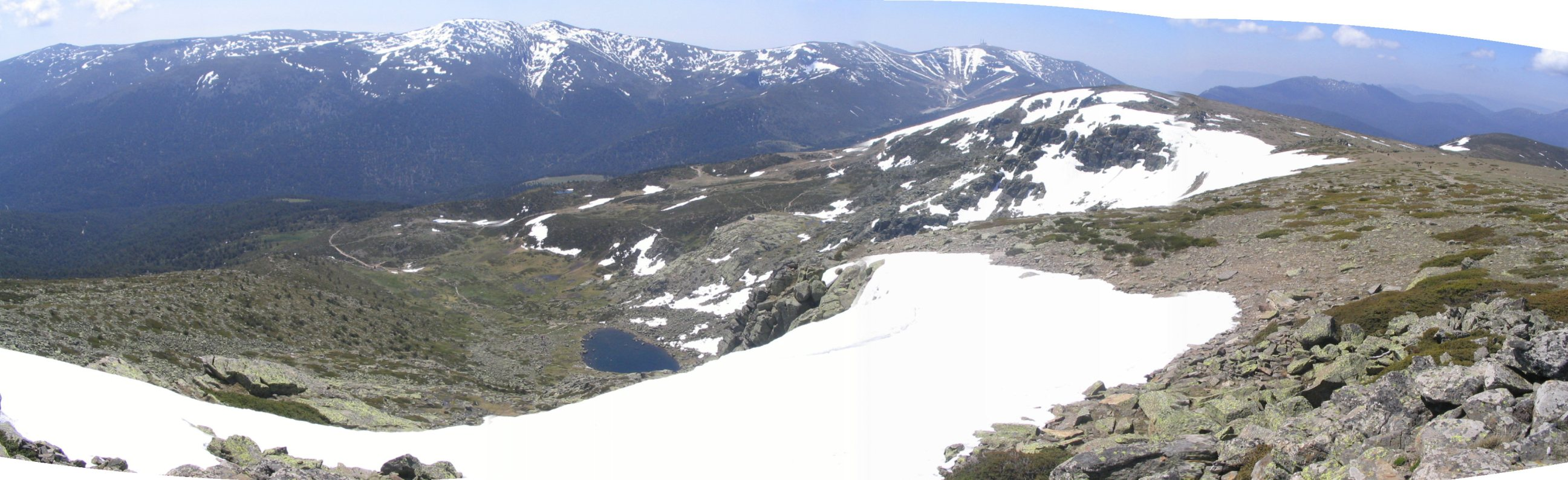 Vista panorámica del Parque Natural de Peñalara y la cara norte de la alineación montañosa de Cuerda Larga (Sierra de Guadarrama, España). La imagen fue tomada el 30 de abril de 2006 desde la línea de cumbres del macizo de Peñalara, concretamente entre las cimas de la Hermana Mayor y Peñalara. En esta época es muy normal encontrarse grandes neveros y ventisqueros por encima de los 2.000 metros de altura, tal y como se aprecia en la imagen. En el ámbito más lejano de la fotografía se aprecian, de izquierda a derecha, la Loma de Pandasco, las Cabezas de Hierro, el Cerro de Valdemartín, la Bola del Mundo y Siete Picos. Salvo la última montaña, el resto pertenecen a Cuerda Larga. A una menor distancia se pueden ver las lagunas de origen glaciar situadas en la vertiente sureste de Peñalara. La que se ve más grande es la Laguna Grande de Peñalara, aunque también se pueden apreciar otras de menor tamaño como es la Laguna Chica de Peñalara. A la derecha de éstas se ven las cumbres de la Hermana Mayor y la Hermana Menor, algo más lejos.